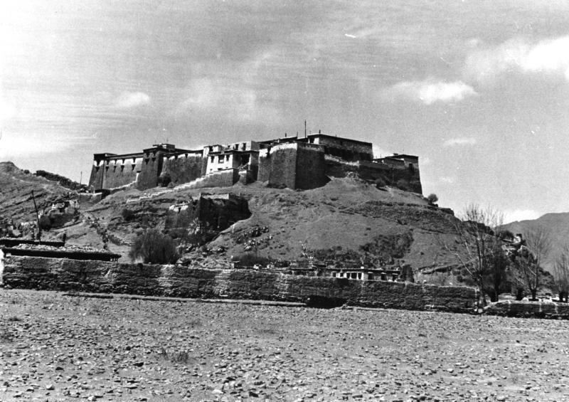 Tschitischio, (Burg ?)